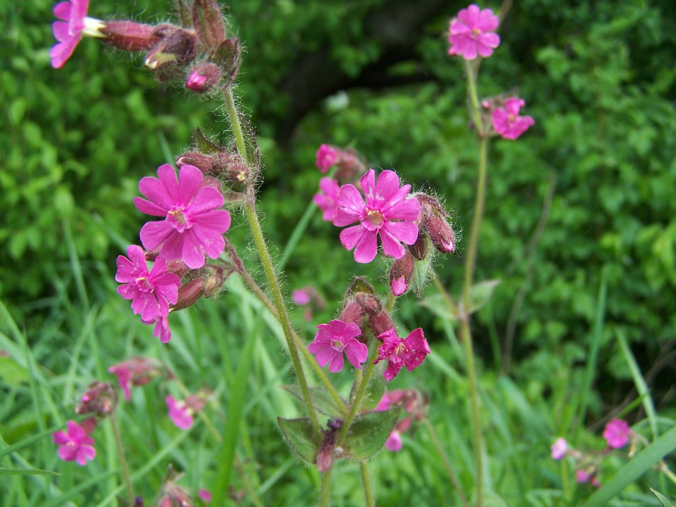 Silene dioica (=Melandrium rubrum) (pl. bniec czerwony, lepnica czerwona)